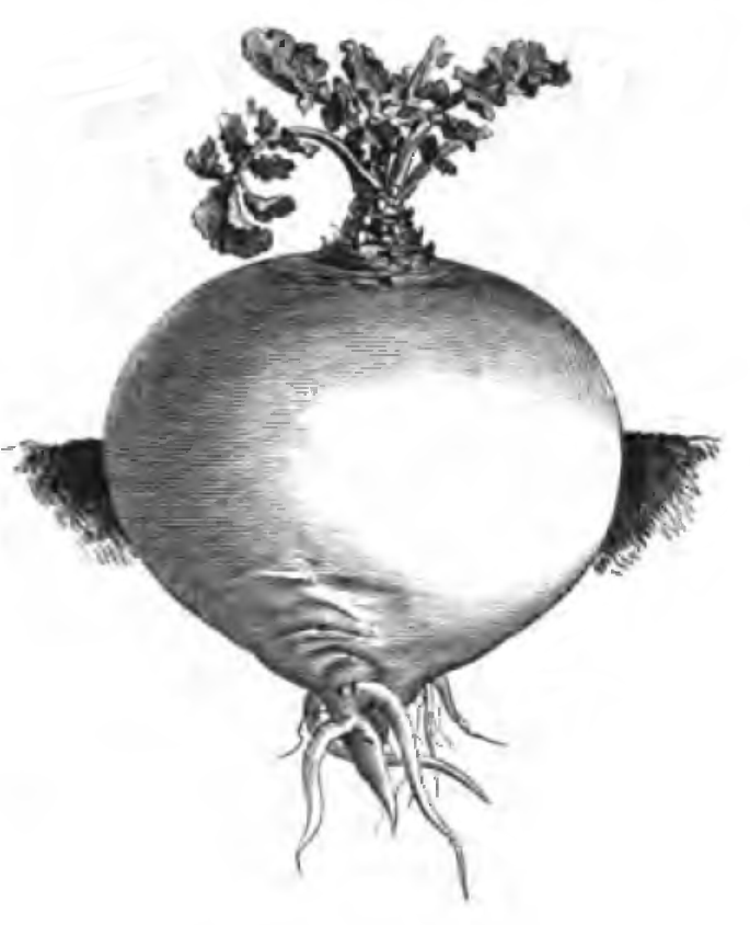 Les plantes potagères. Description et culture des principaux légumes des climats tempérés, 1re édition, ouvrage publié par la maison Vilmorin-Andrieux & Cie à Paris en 1883.